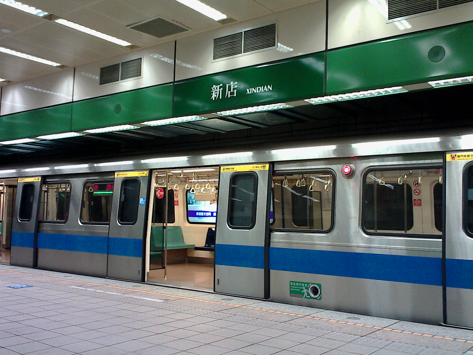 臺北捷運新店線新店站月臺。